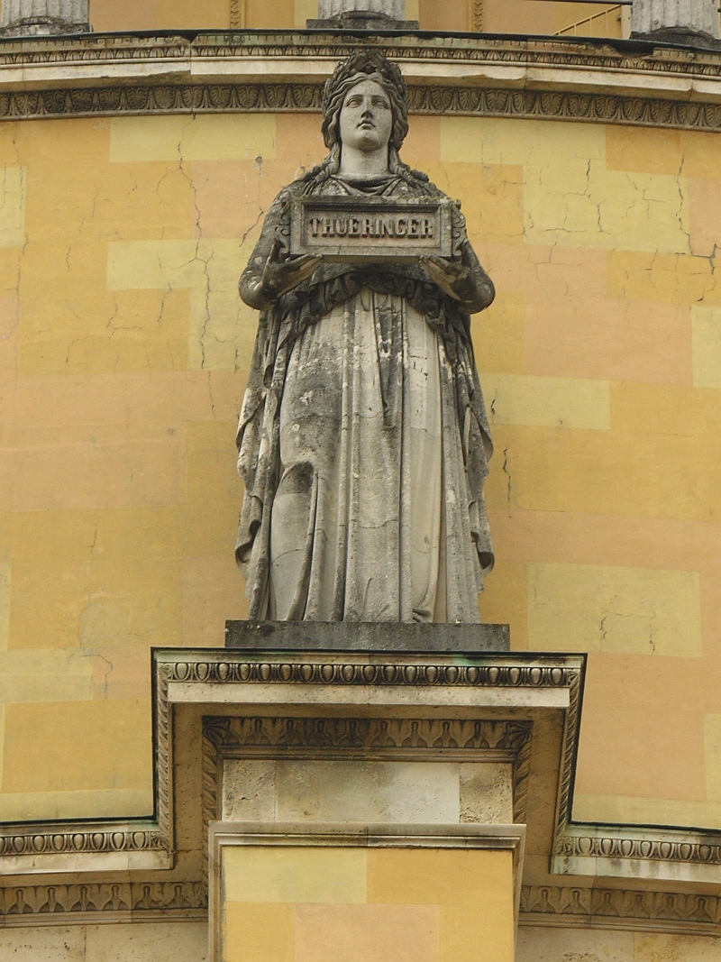 Diese Statue an der Aussenseite der Befreiungshalle in Kelheim steht für den Volksstamm der Thueringer (Schreibweise beachten), Höhe der Statue 580 cm. Sie ist eine von 18 Statuen, die nach Modellen des Bildhauers Johann Halbig geschaffen wurden.